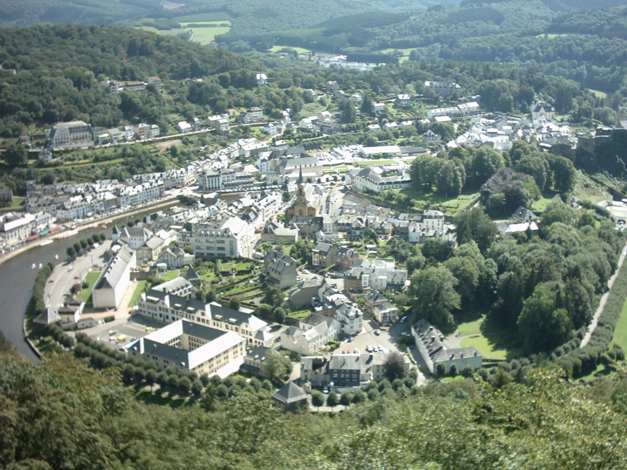 zicht op de stad Bouillon